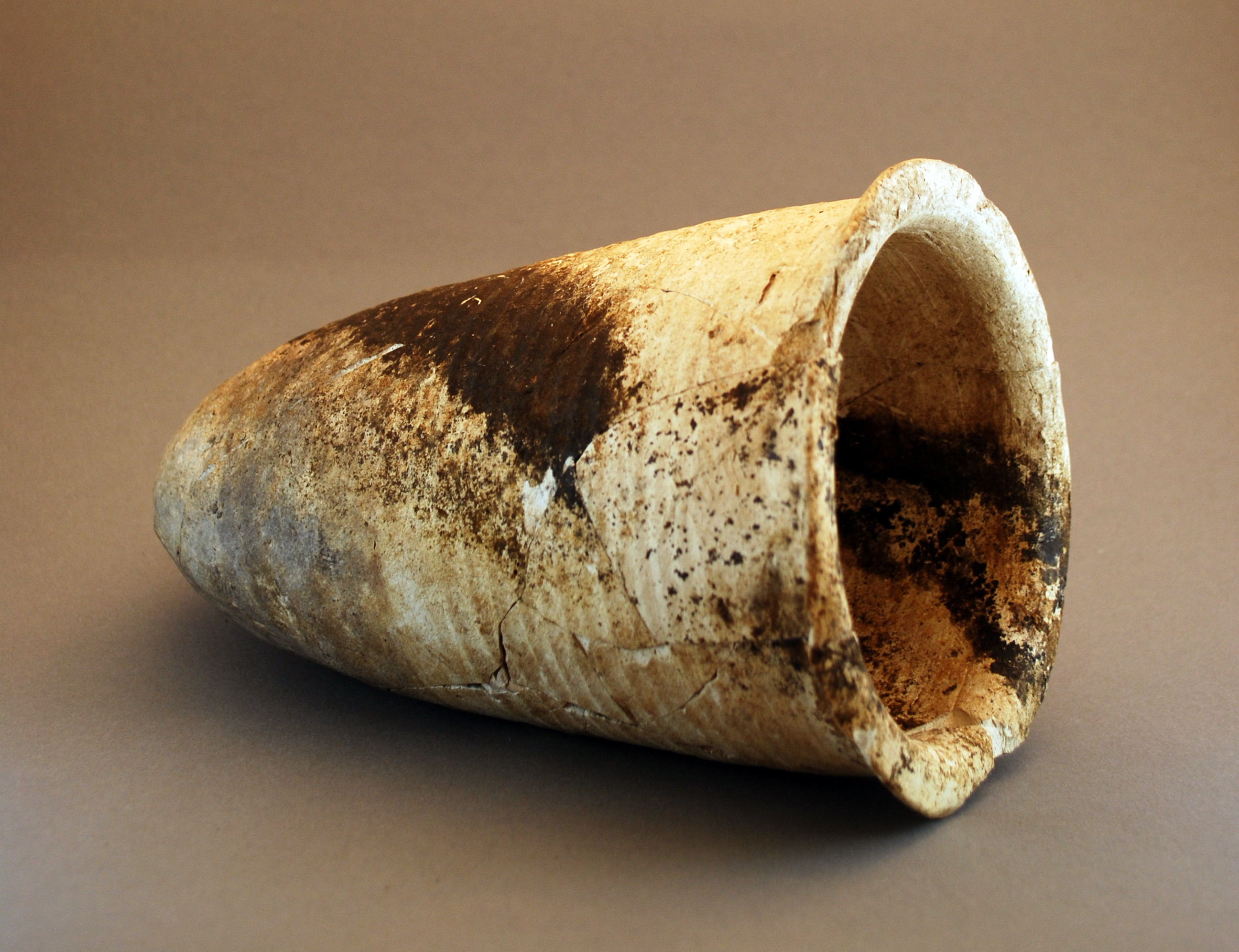 Becherkachel, spitzkonische Form aus heller Irdenware, Rheinland 13. Jahrhundert